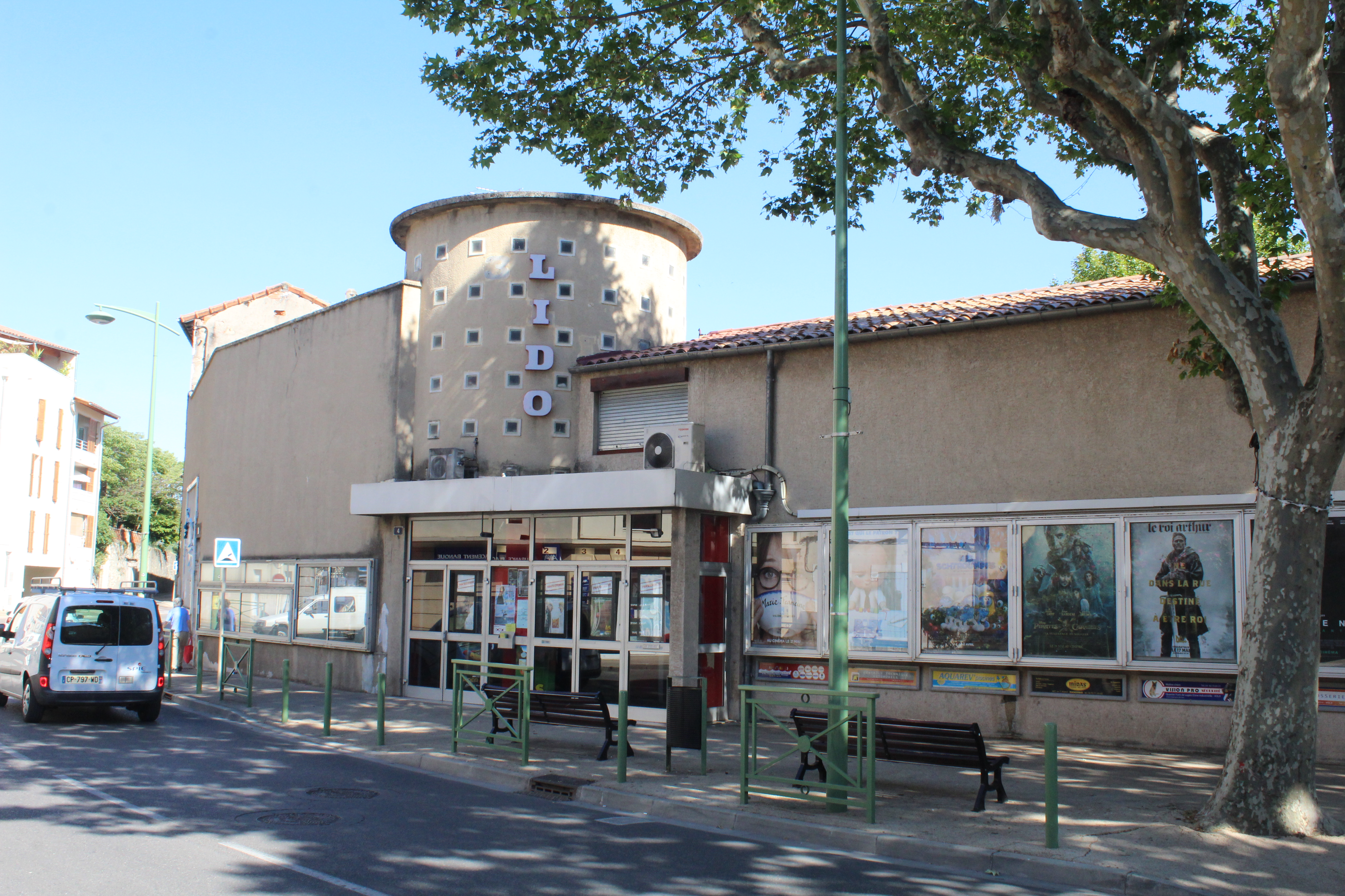 Cinéma Le Lido, Manosque.